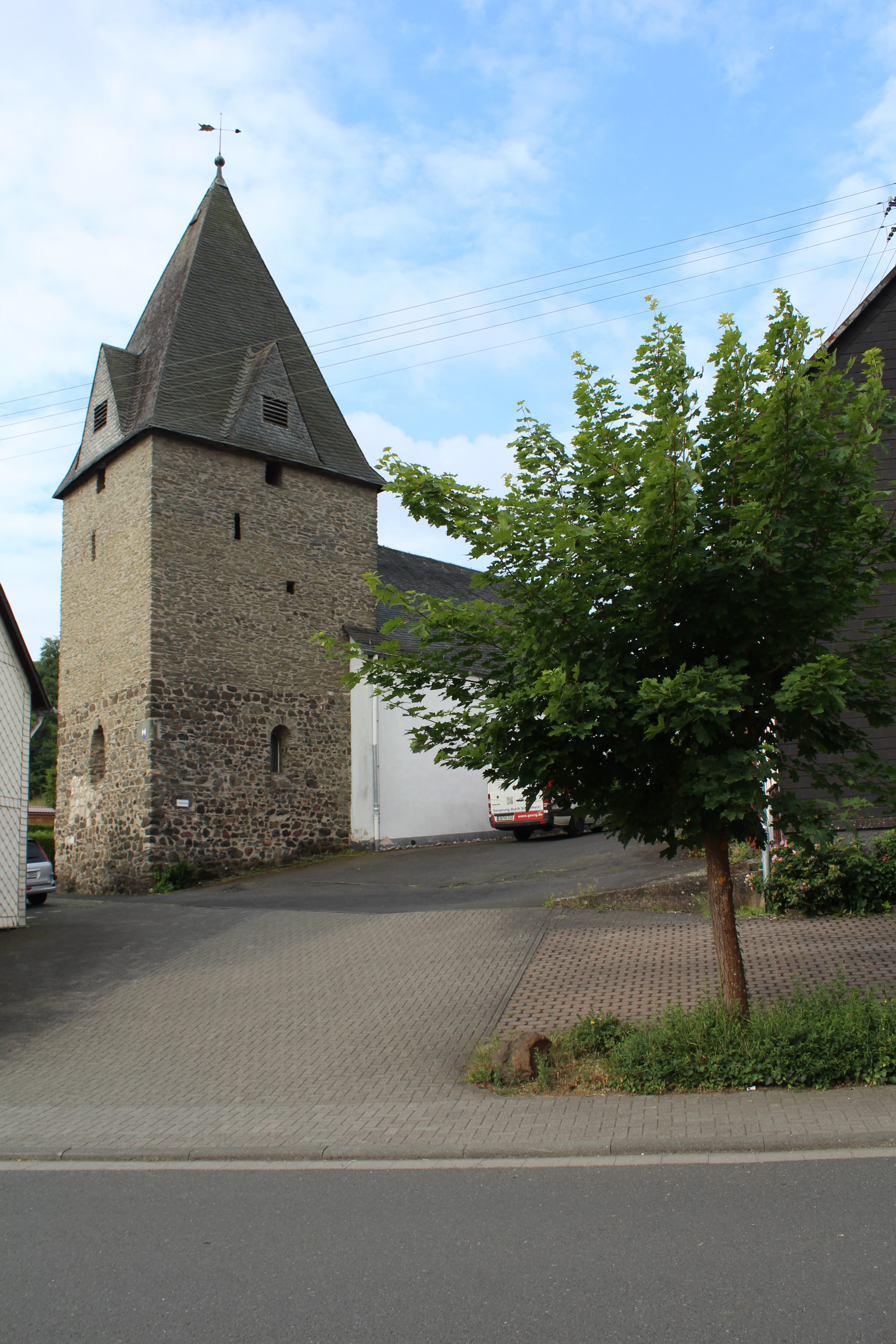 Evangelische Kirche Medenbach, Breitscheid, Lahn-Dill-Kreis, Hessen, Deutschland